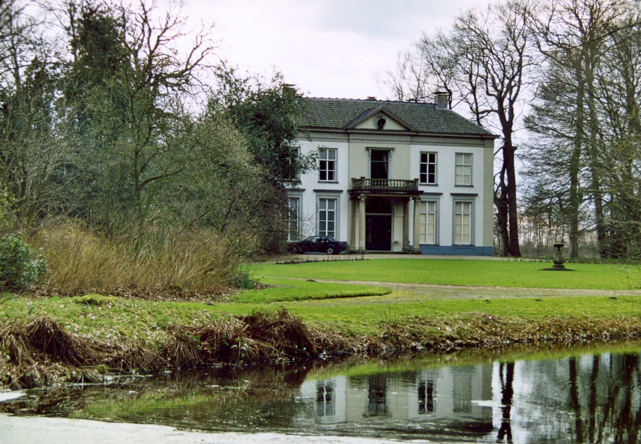 Huis de Colckhof te Liederholthuis.